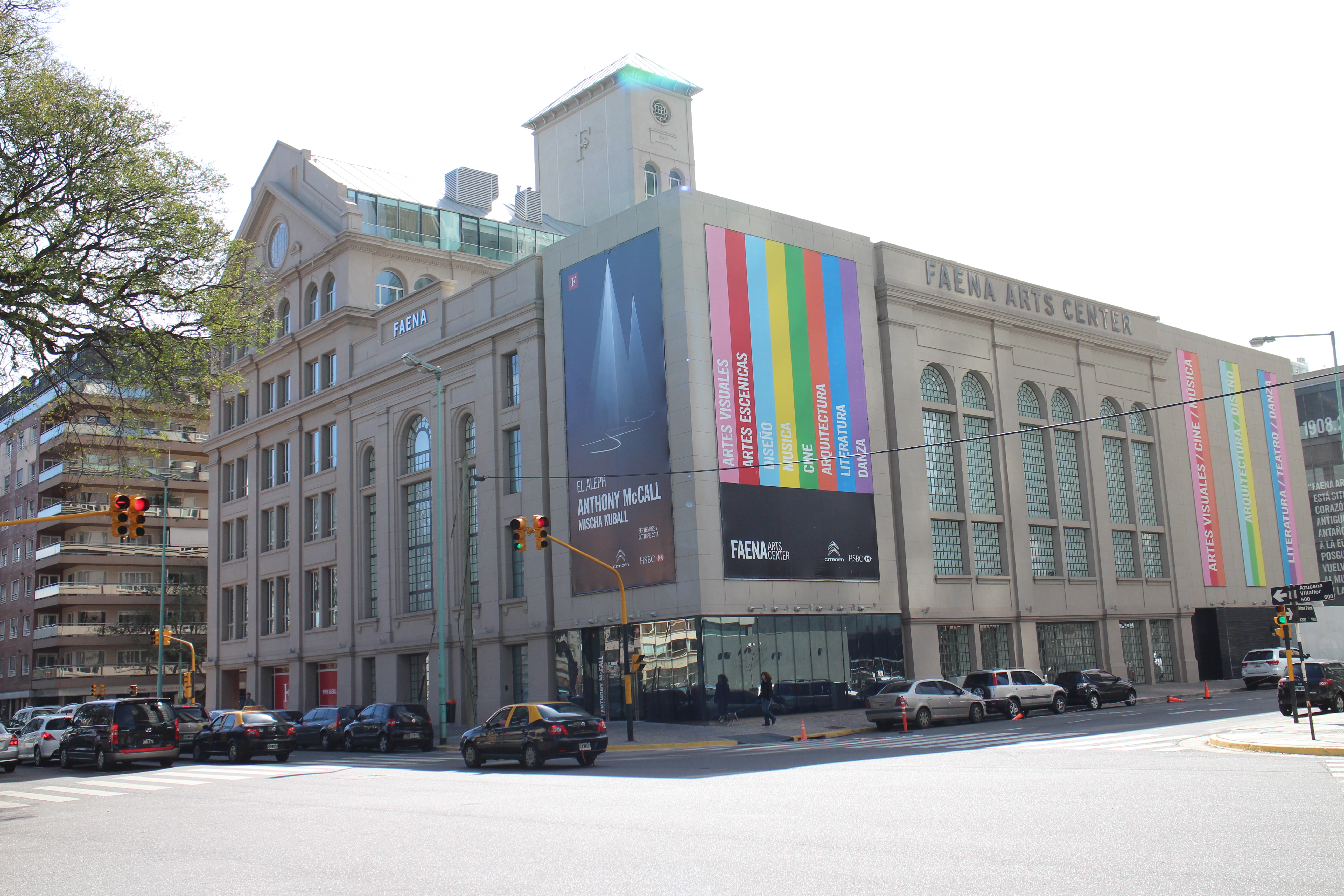 Faena Arts Center, Puerto Madero, Ciudad Autónoma de Buenos Aires.